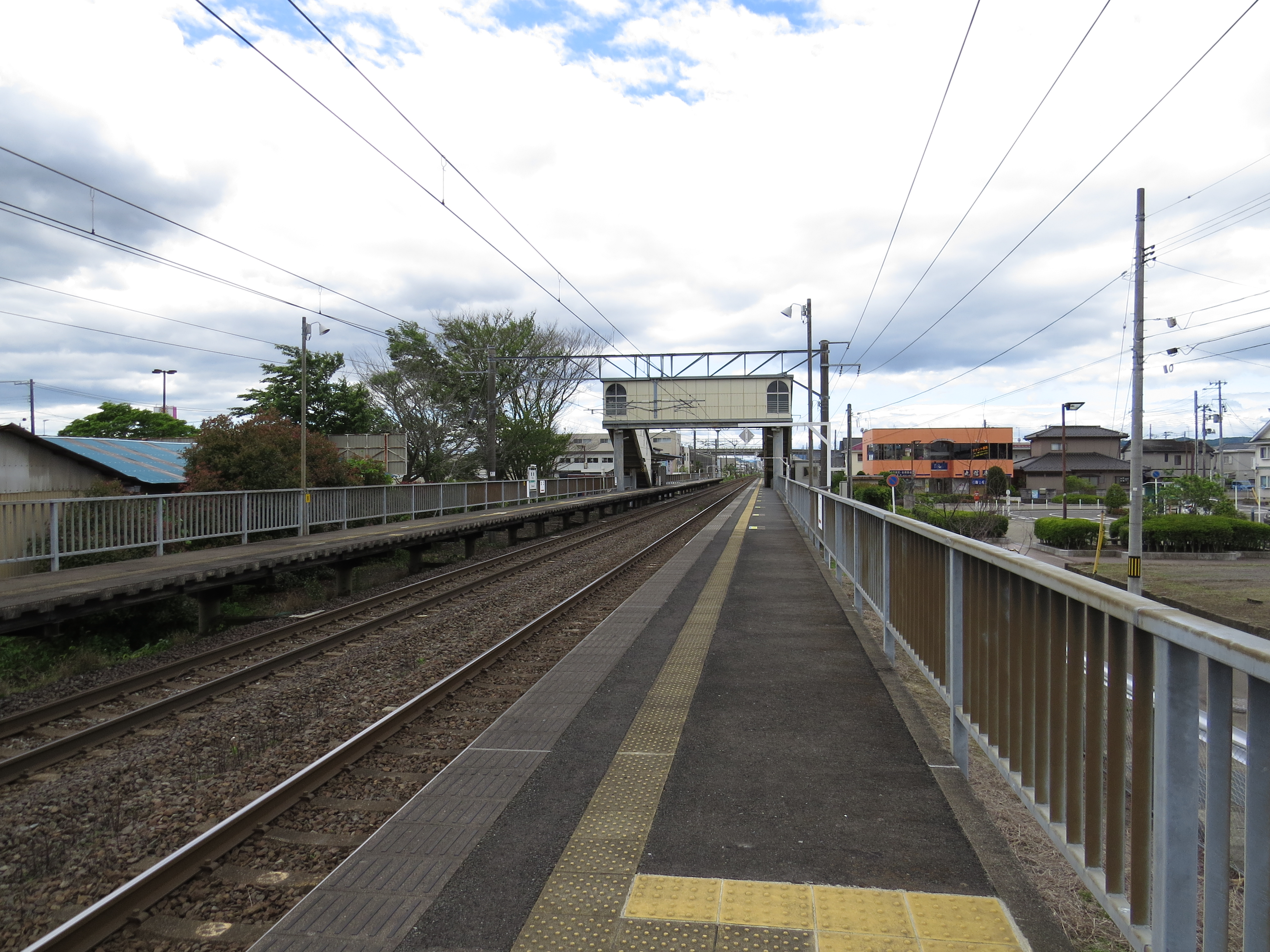 JR東日本 館腰駅 ホーム